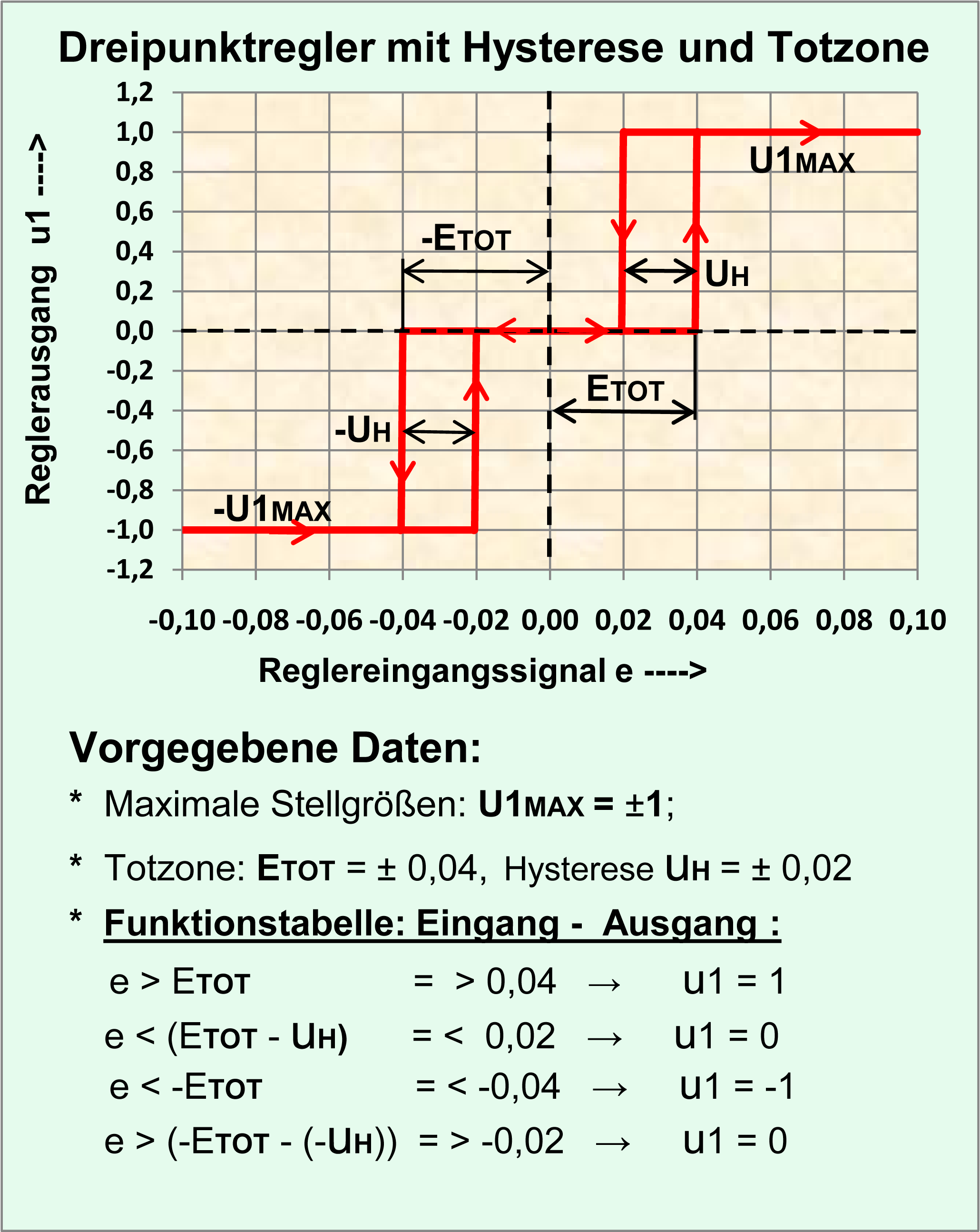 XY-Grafik des Eingangs- Ausgangsverhaltens eines Dreipunktreglers